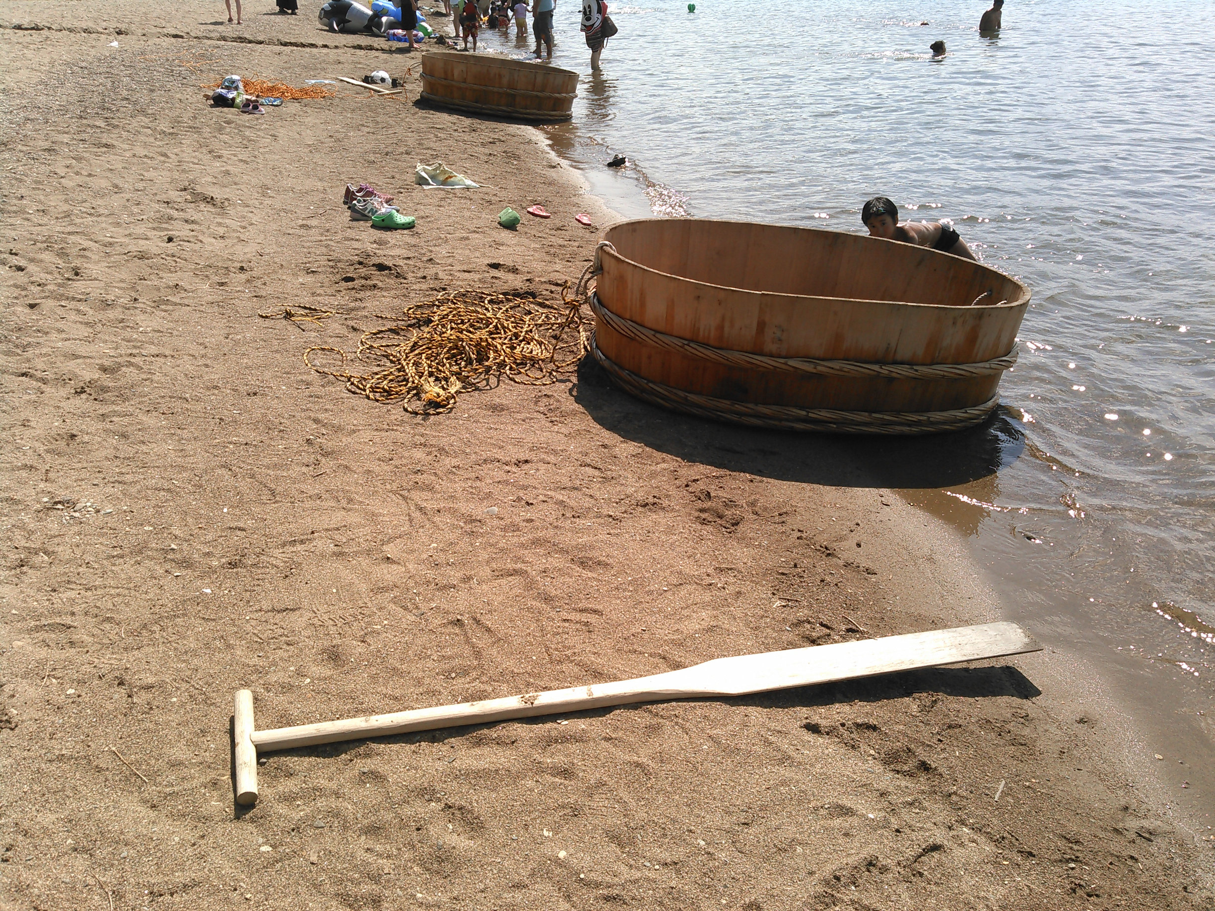 郡山市湖南町の湖まつりの体験用たらい舟